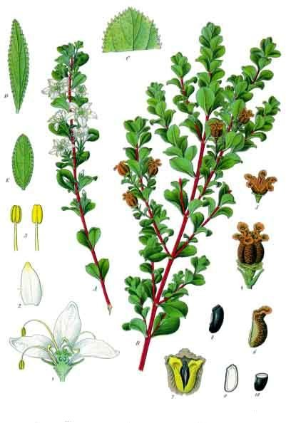 Bucco. A blühender Zweig. B Fruchtzweig. C Blattspitze von Barosma betulina Wendl. D Blatt von Barosma serratifolia Willd. E Blatt von Barosma crenulata Hook. 1 Blüte im Längsschnitt; 2 Blumenblattes; 3 Staubblätter; 4 Pistill; 5 reife Frucht; 6 eine Kapsel davon; 7 dieselbe aufgesprungen, von der Achse ausgesehen; 8 Samen; 9 Längsschnitt; 10 Querschnitt.